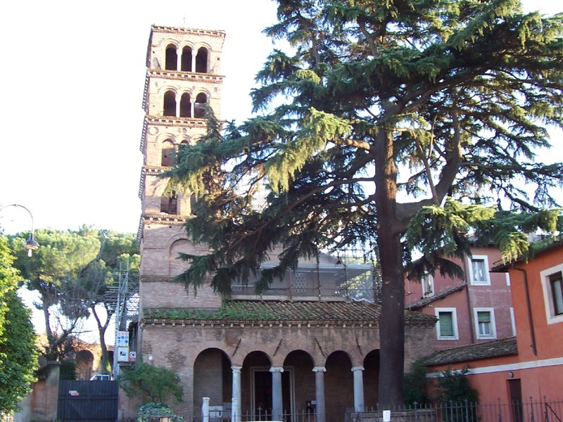 Roma - Chiesa di S. Giovanni a Porta Latina